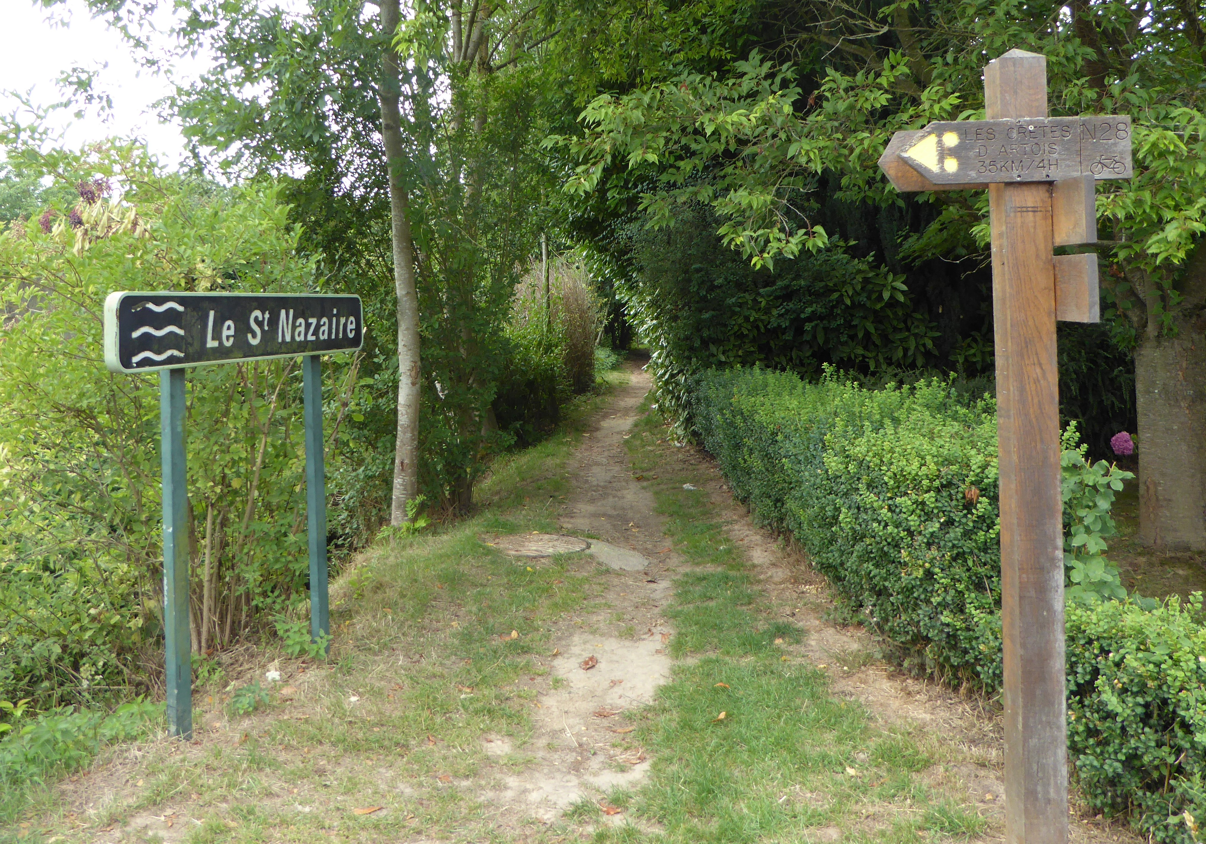 Ruisseau "Le St Nazaire" affluent de La Souchez (riviére) à Ablain-Saint-Nazaire Pas-de-Calais, Hauts-de-France France